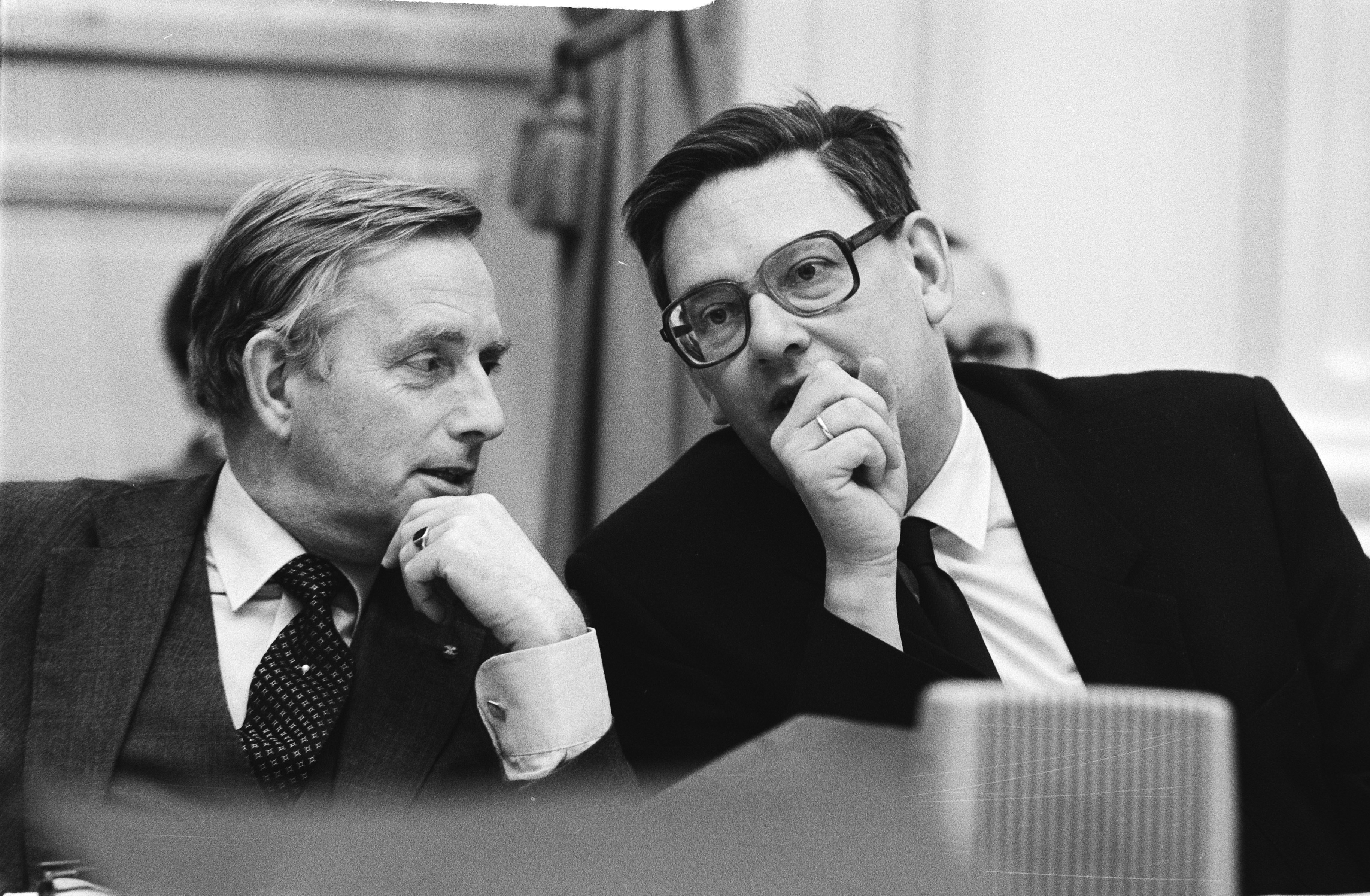 Collectie / Archief : Fotocollectie Anefo Reportage / Serie : Algemene beschouwingen in de Tweede Kamer in november 1982 Beschrijving : Ministers Korthals Altes (Justitie) (l) en Van Aardenne (Economische Zaken) Datum : 24 november 1982 Locatie : Den Haag, Zuid-Holland Trefwoorden : kabinetsbeleid, ministers, parlementaire debatten Persoonsnaam : Aardenne, Gijs van, Korthals Altes, Frits Fotograaf : Croes, Rob C. / Anefo Auteursrechthebbende : Nationaal Archief Materiaalsoort : Negatief (zwart/wit) Nummer archiefinventaris : bekijk toegang 2.24.01.05 Bestanddeelnummer : 932-4162